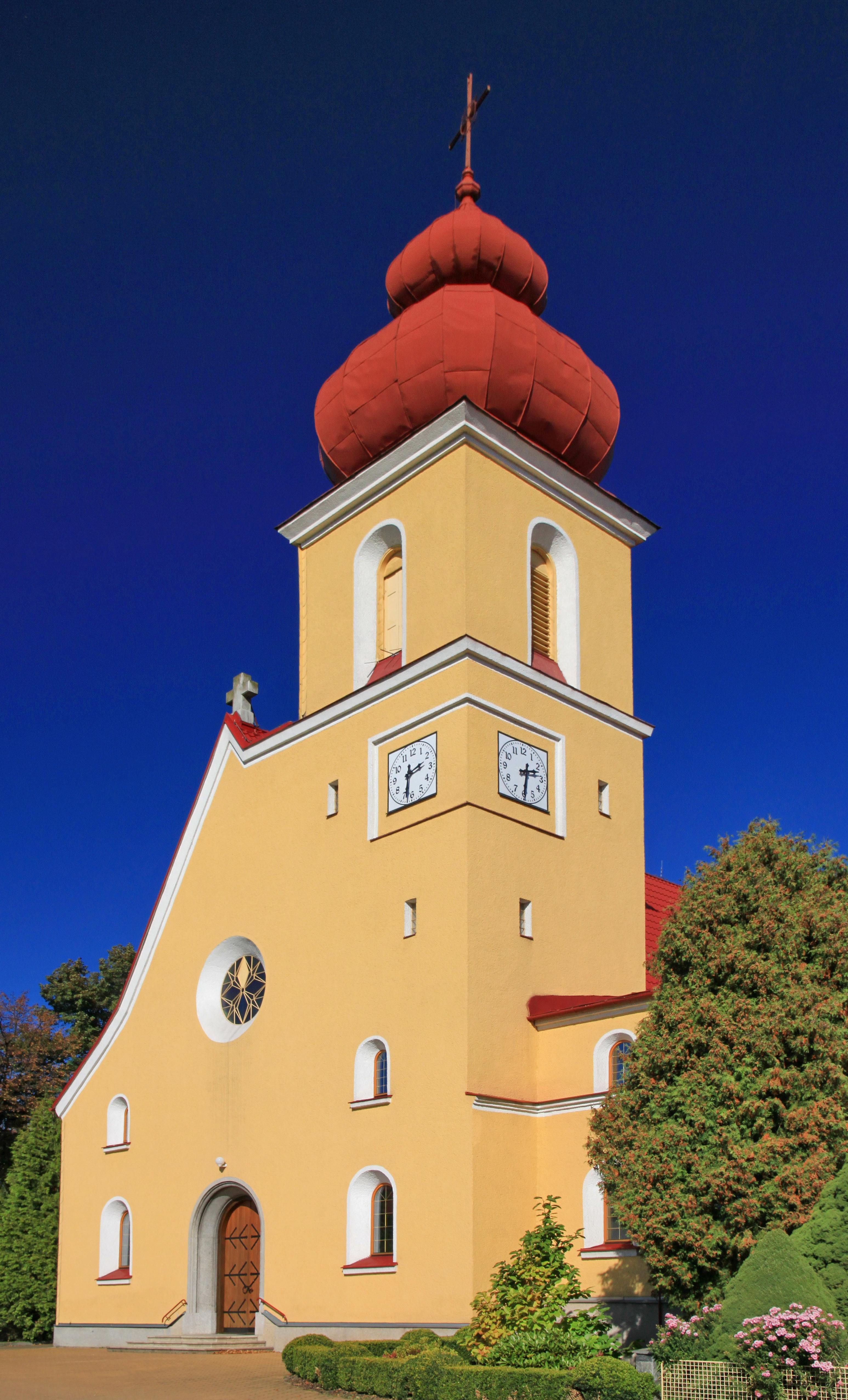 Jablunkov, klášter s bývalým klášterním kostelem alžbětinek, Bezručova 395